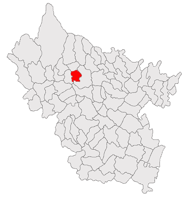 Categorie:Hărţi ale judeţului Buzău